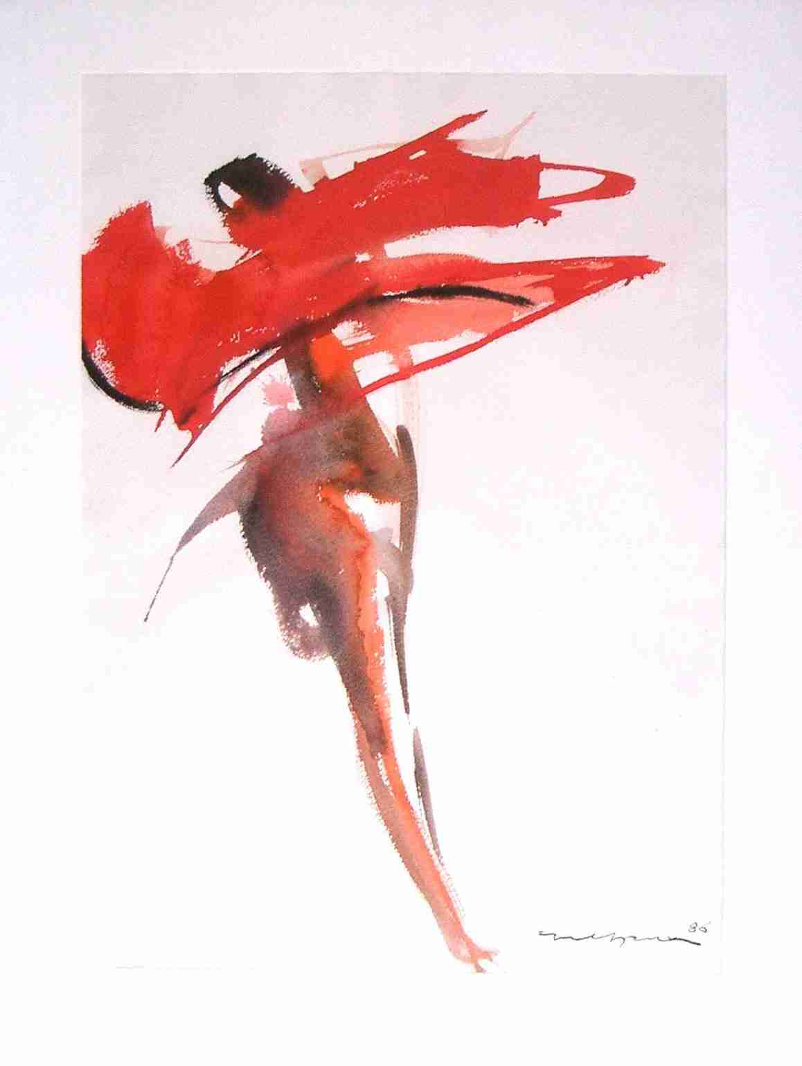 Zeichnung Flamenco Edith Hultzsch 1986